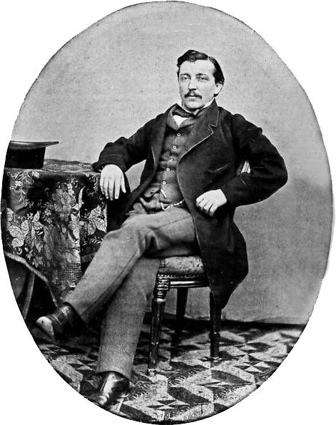 Rudolf Scheller, erster Produzent von Trockensuppen